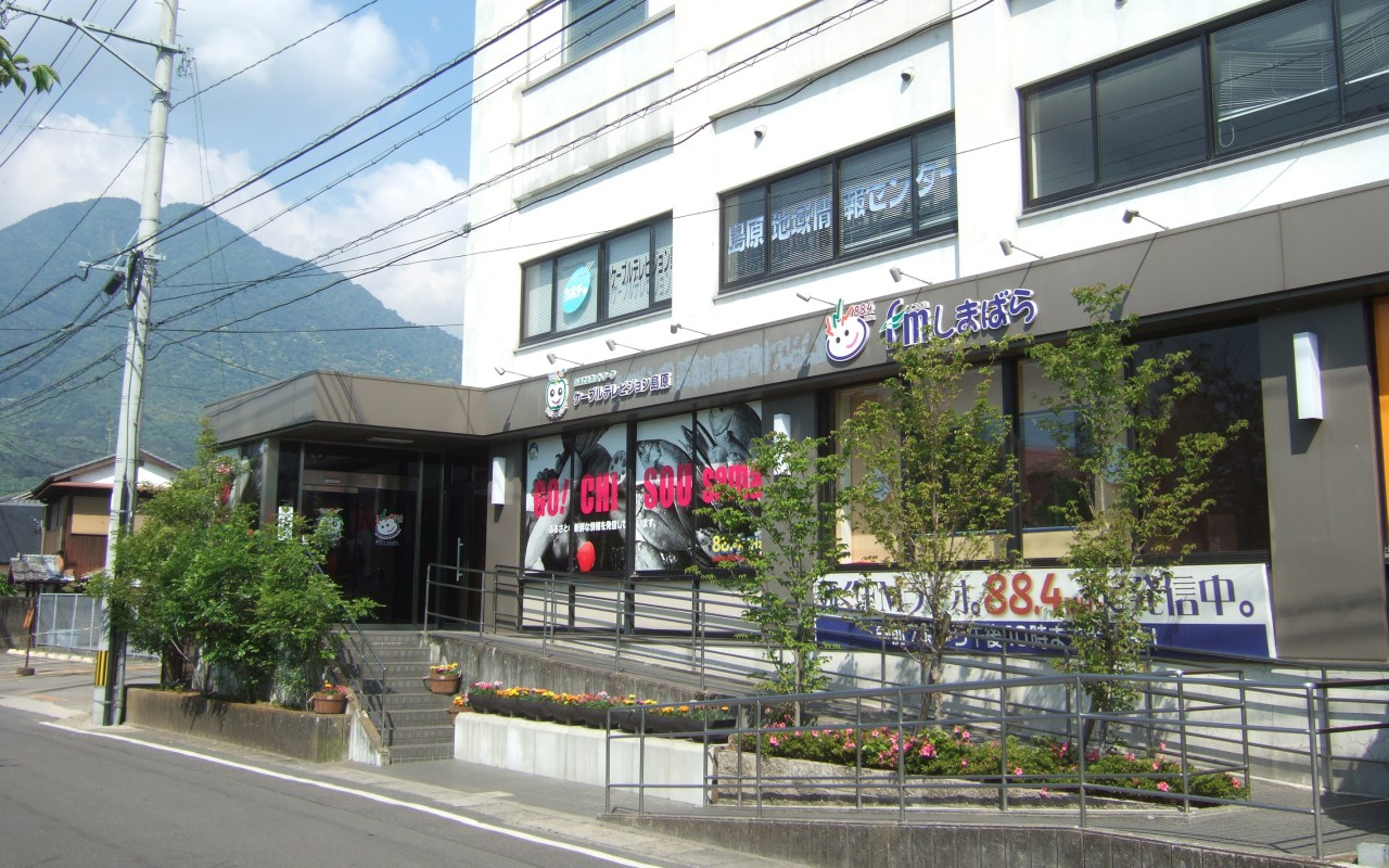 ケーブルテレビジョン島原及びFMしまばら本社（長崎県島原市白土町・NTTビル1階部分）